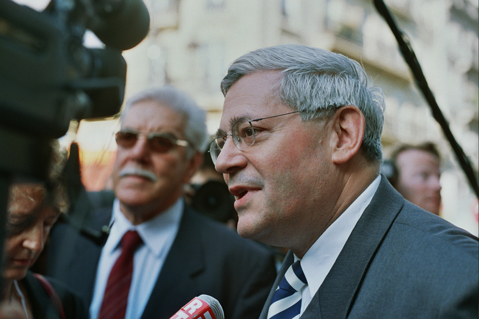 Bruno Gollnisch interviewé à Paris, lors de la manifestation du Front National en hommage à Jeanne d'Arc le 1er mai 2005.